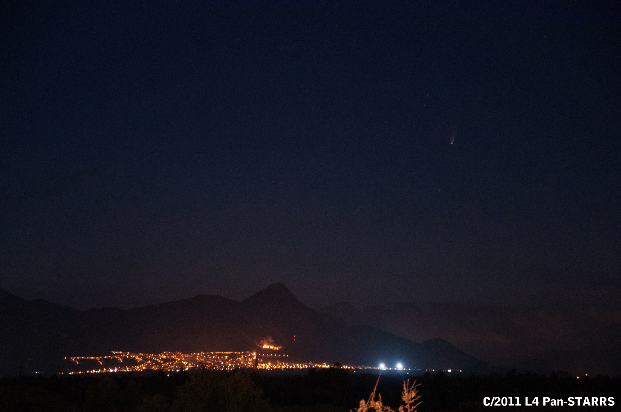 Cometa Pan-STARRS vista dalla Sardegna (Italy)